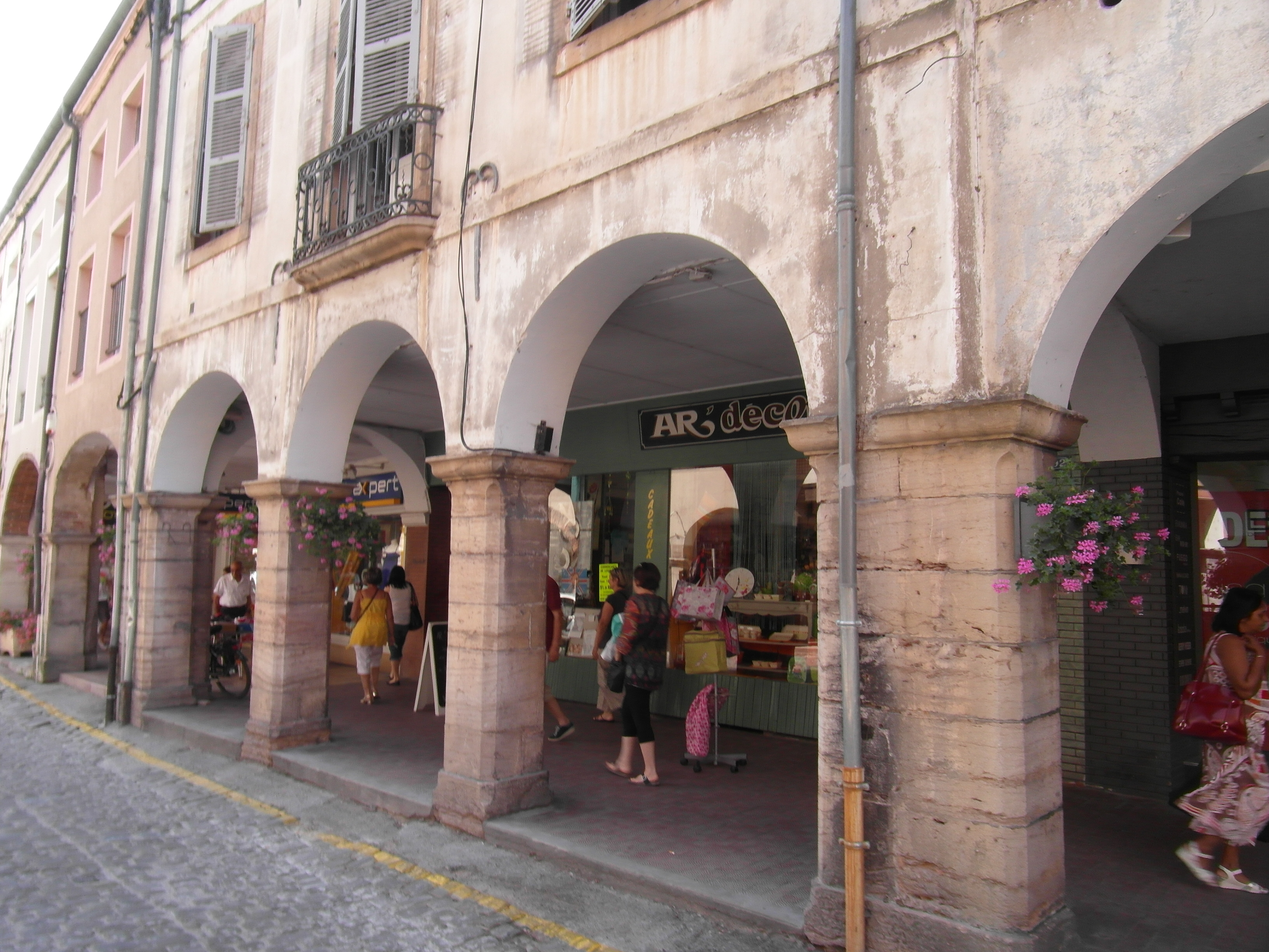 Les arcades de Louhans en juillet 2015